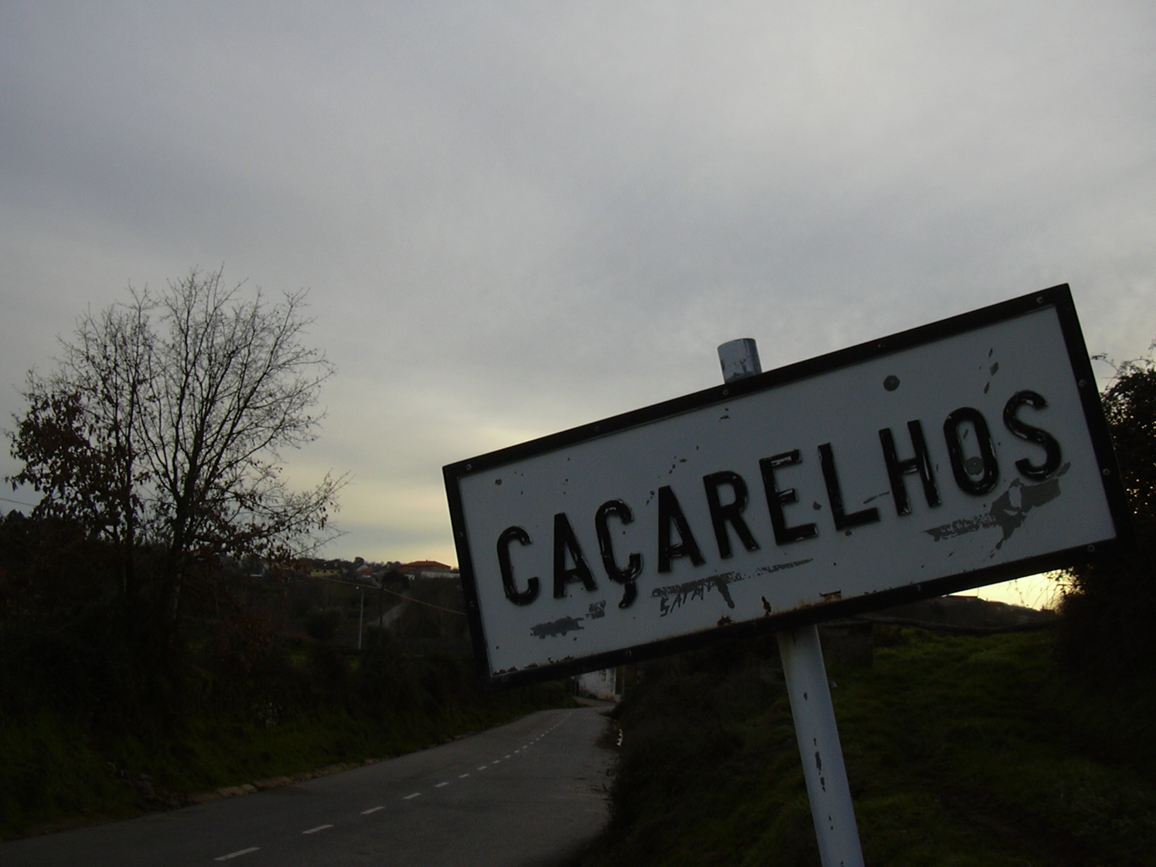 Caçarelhos, concelho de Vimioso, Portugal.